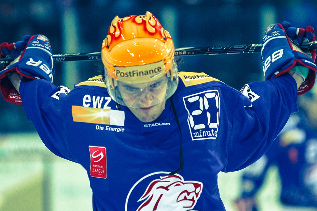 Roman Wick avec l'uniforme du ZSC Lions.